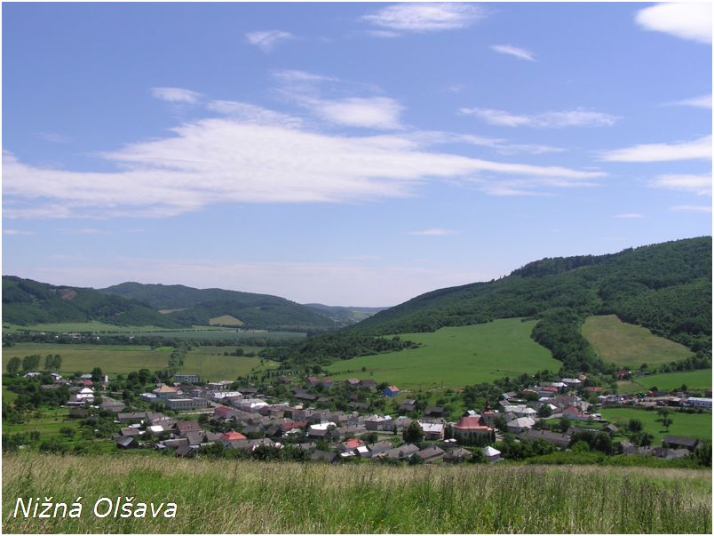 Celkový pohľad